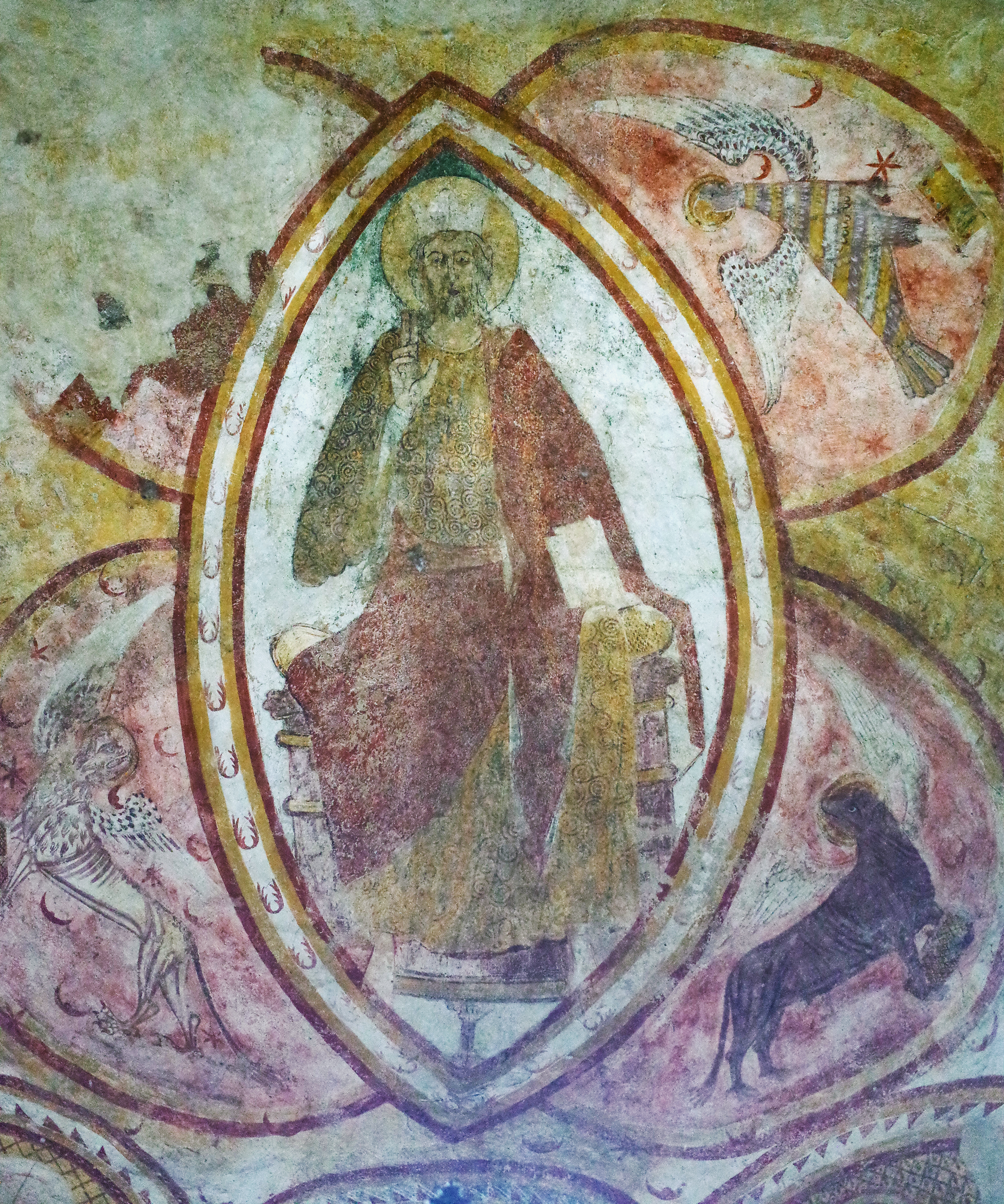 Christ en majesté dans l'abside de l'église St-Genest de Lavardin.